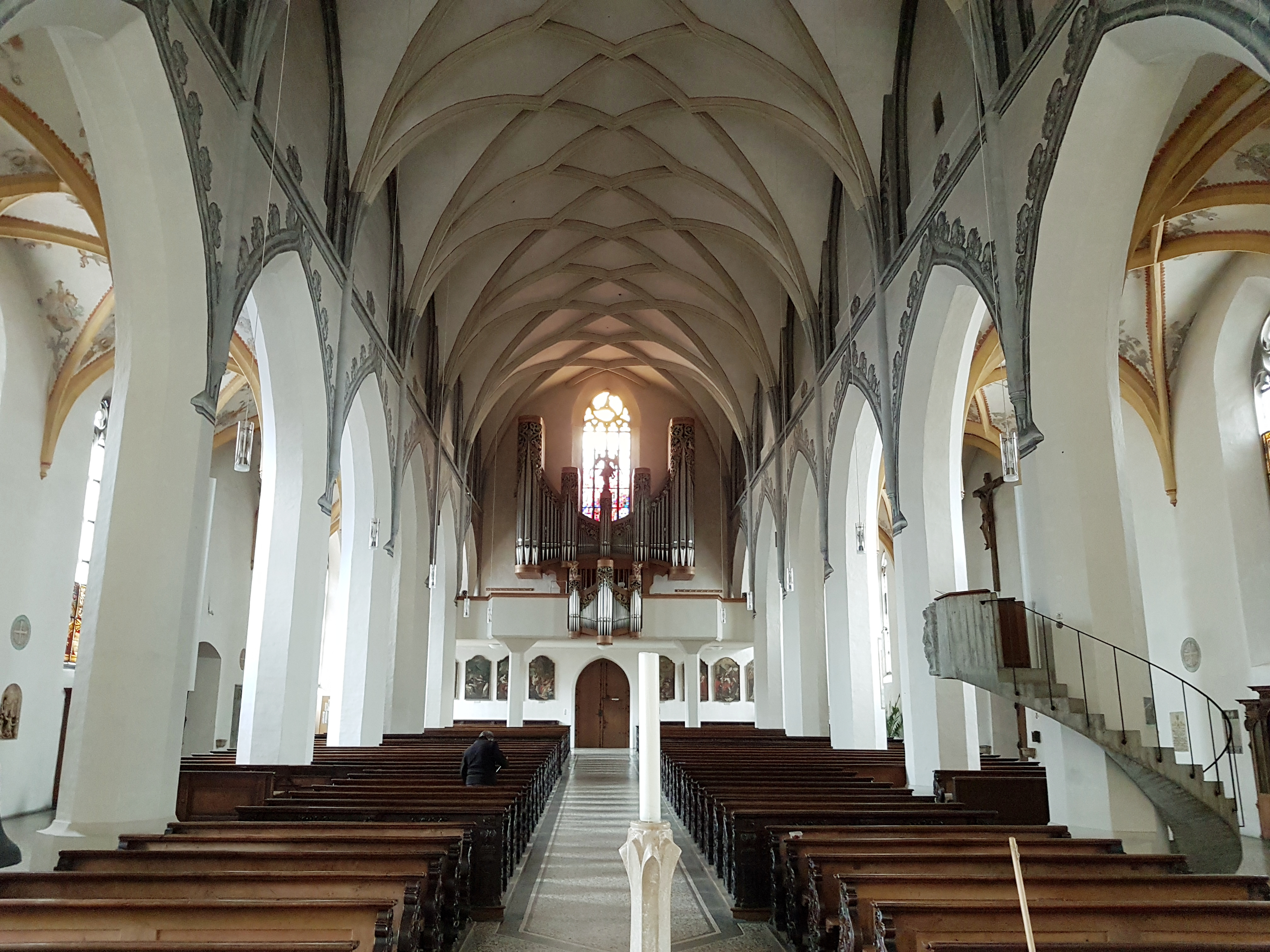 Liebfrauenmünster Donauwörth, Innenraum mit Blick zur Empore